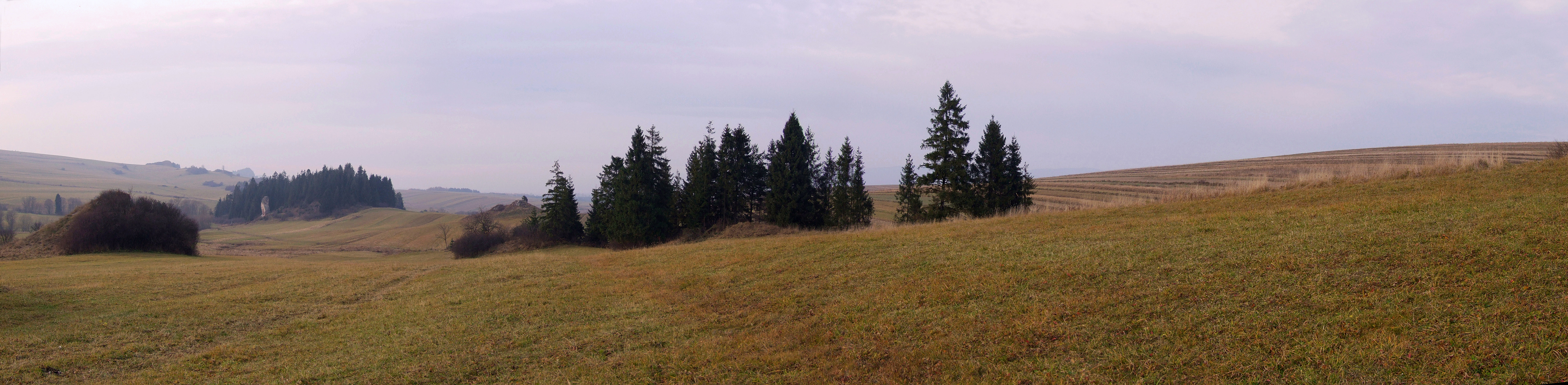 Dursztyńskie Skałki